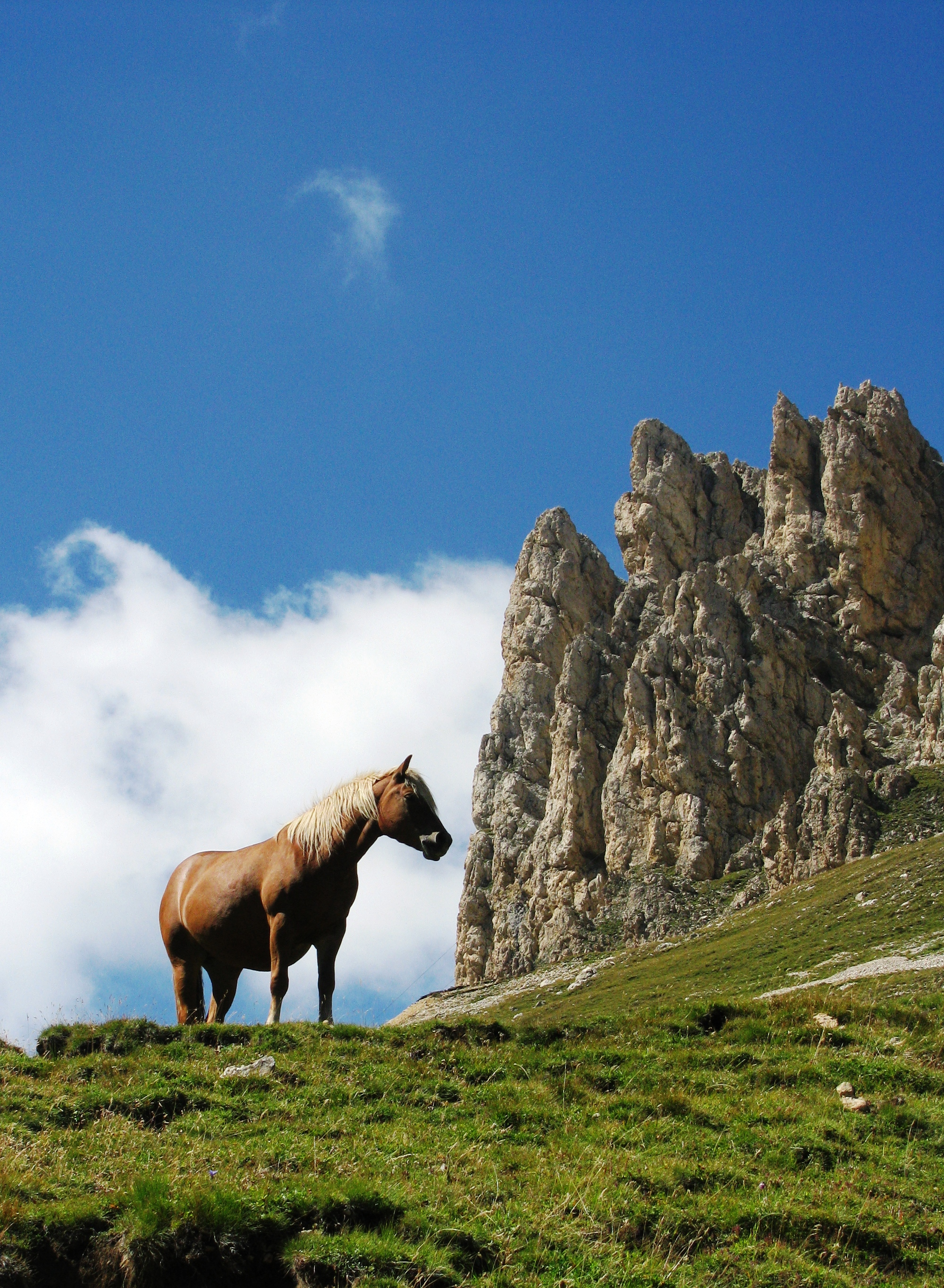 Haflinger on Seiseralm